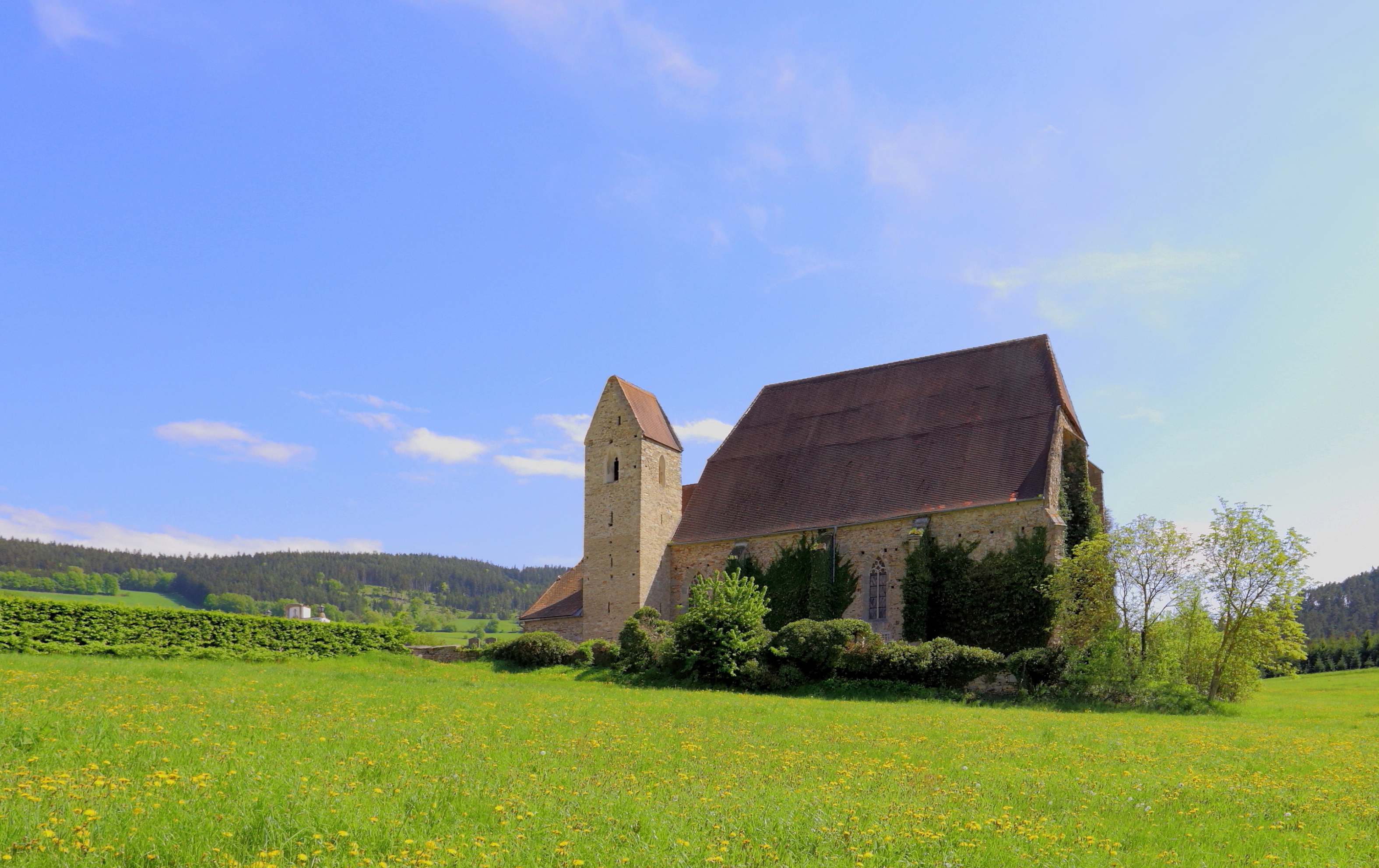 Nordansicht der katholischen Filialkirche hl. Anna im Felde in der niederösterreichischen Marktgemeinde Pöggstall. Die spätgotische Hallenkirche mit einem hochgotischen Chor und einem spätgotischen Nordturm wurde auf einer Anhöhe außerhalb des Ortes errichtet und ist vom Friedhof und einer Umfassungsmauer umgeben. Bis 1810 war sie die Pfarrkirche von Pöggstall, ab 1830 wurde sie dem Verfall und der Plünderung preisgegeben. Seit dem Ende des 19. Jahrhunderts bestehen Restaurierungsbestrebungen.